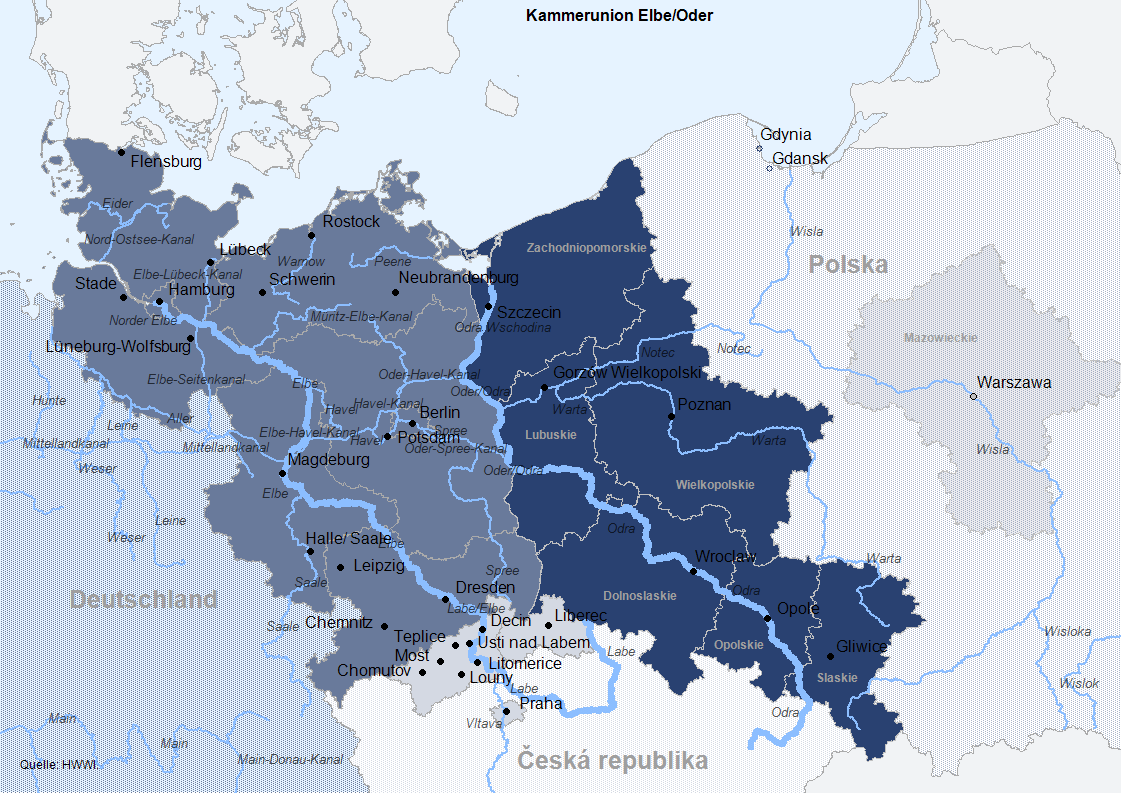 Karte KEO-Region